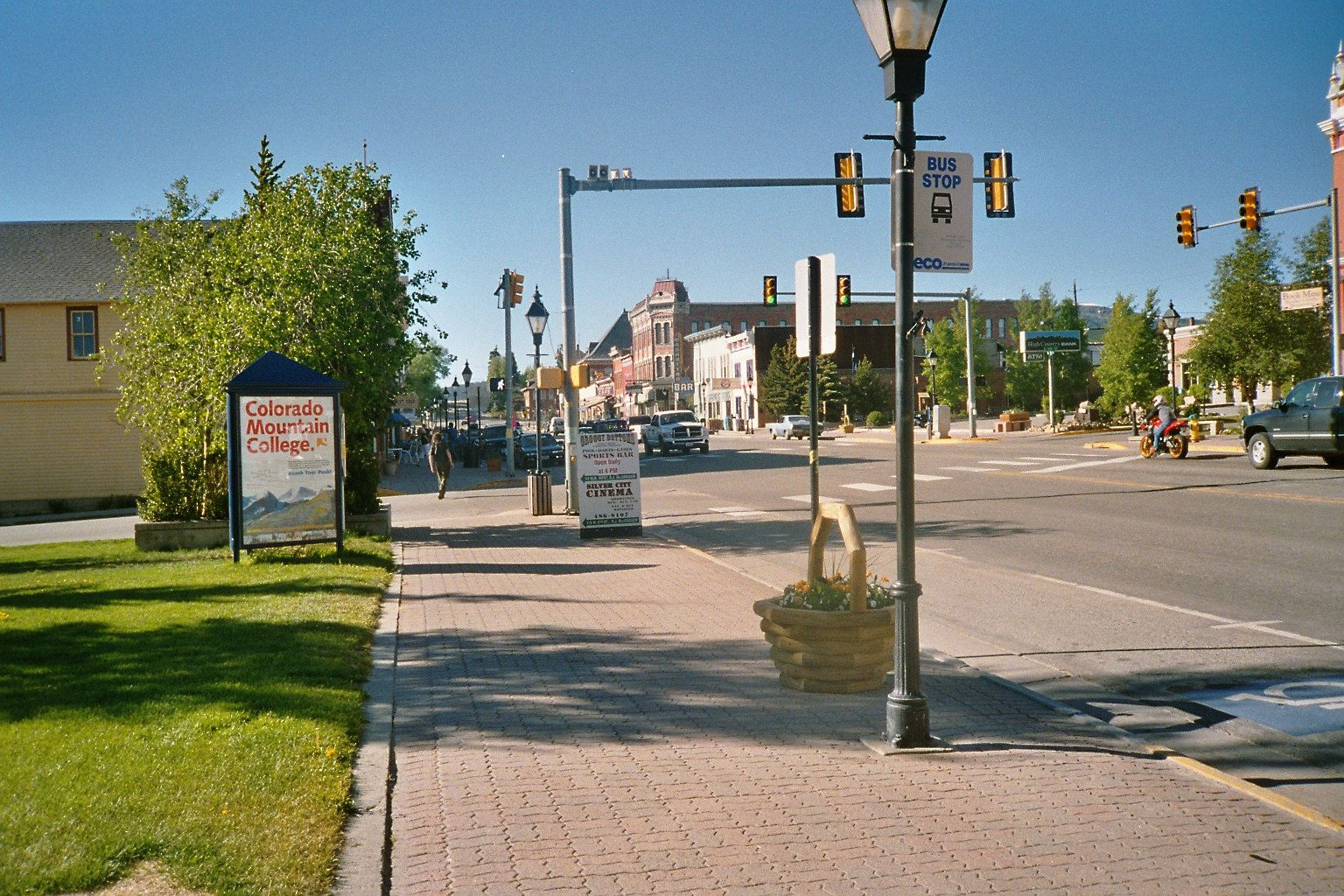 Colorado Leadville